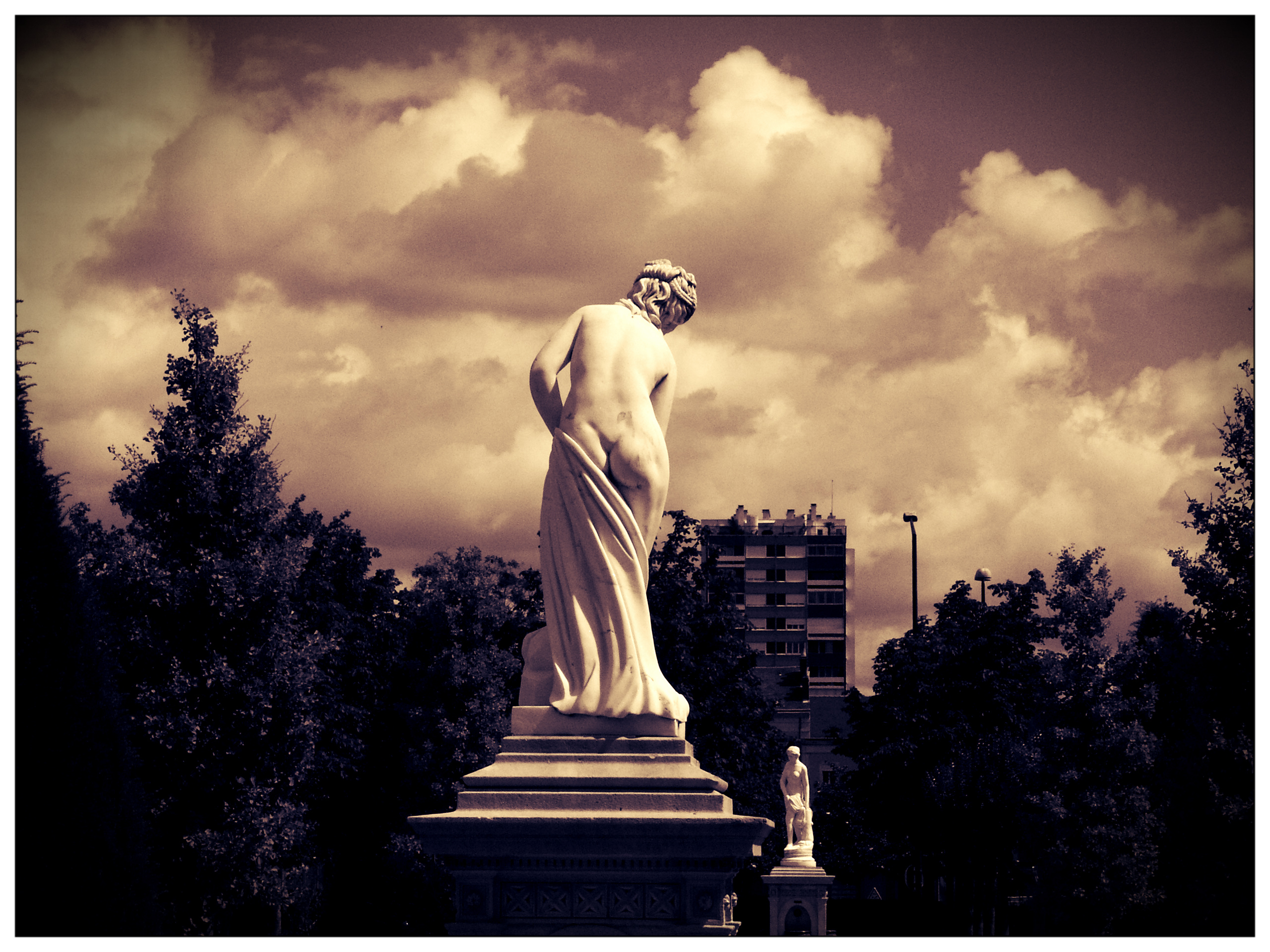 Statue au parc du mail